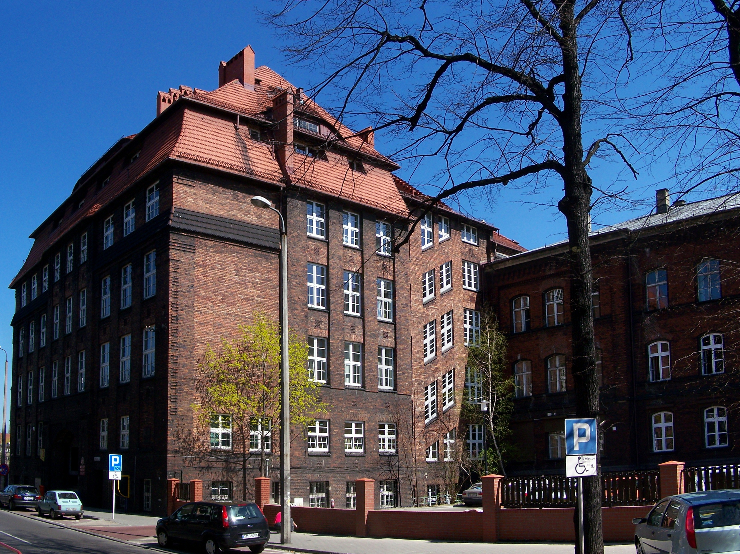 Budynek główny Instytutu Chemii Uniwersytetu Śląskiego w Katowicach.